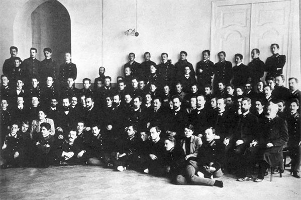 Профессора и студенты Саратовского университета. Фото Н. Гольдберга. 1909 год.